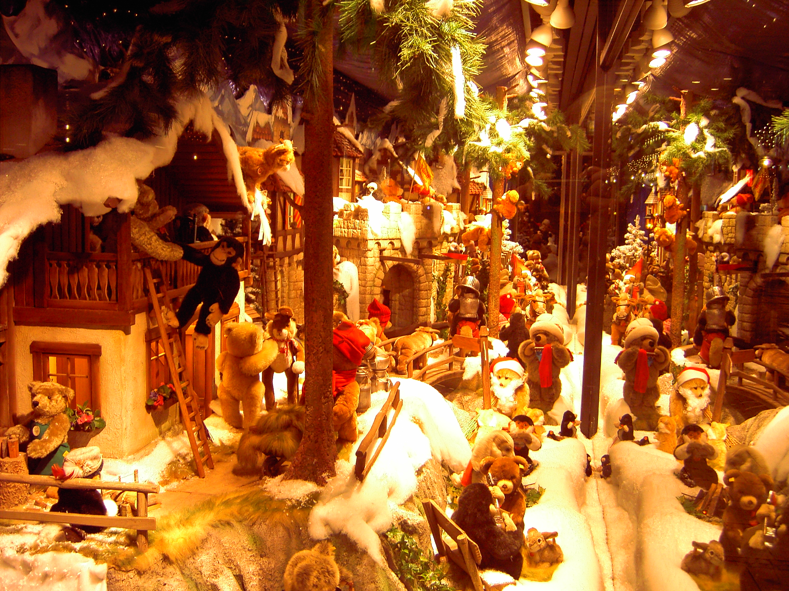 Bilder aus dem vorweihnachtlichen München